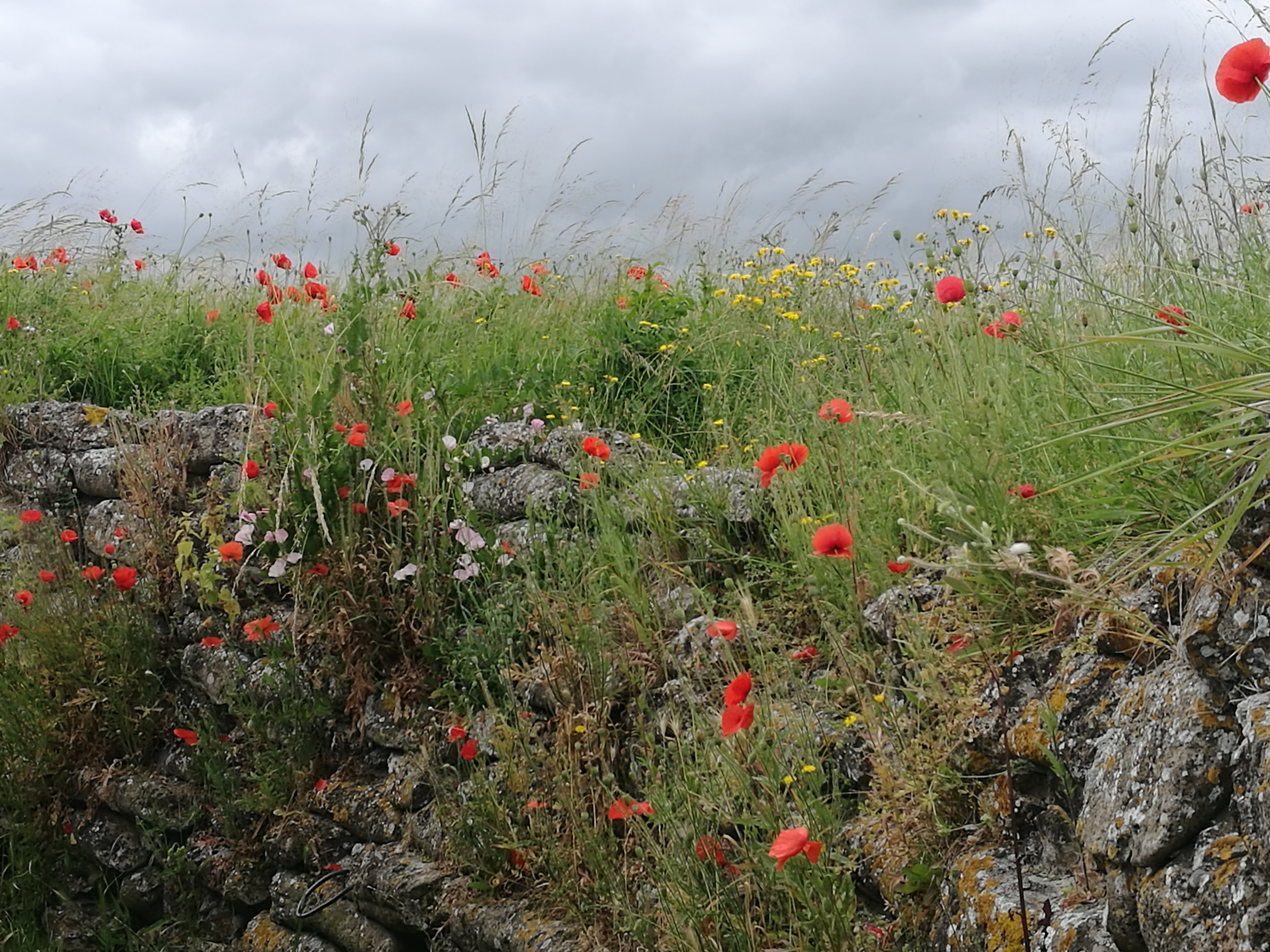 Poppies tussen de loopgraven, Dodengang, Ijzerdijk 62 8600 Diksmuide This photo of immovable heritage has been taken in the Flemish Region